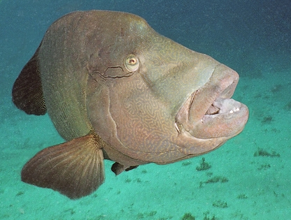 Wargacz garbogłowy, chelin napoleoński, napoleon